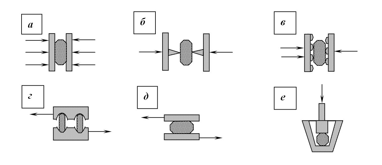 Зображення:Методи дроблення.JPG: Методи дроблення